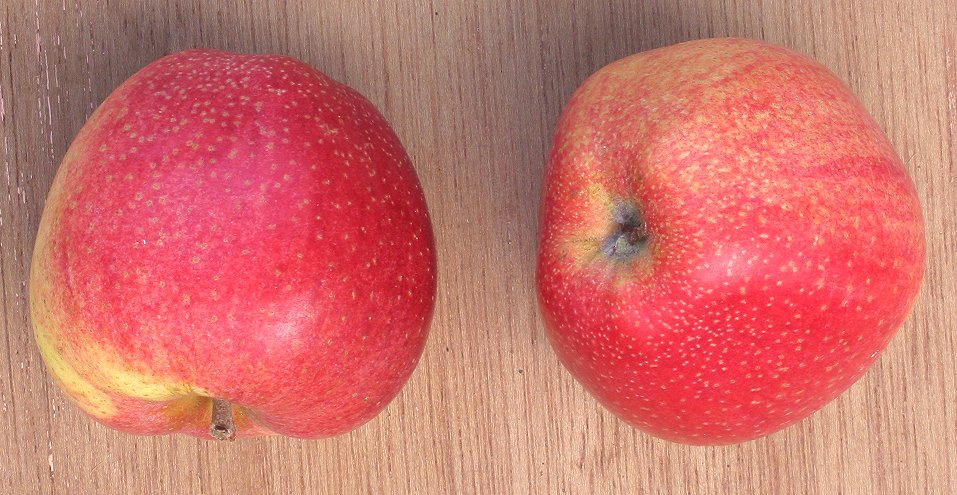 zelfgemaakte foto van het appelras Zoete Ermgaard; eind oktober